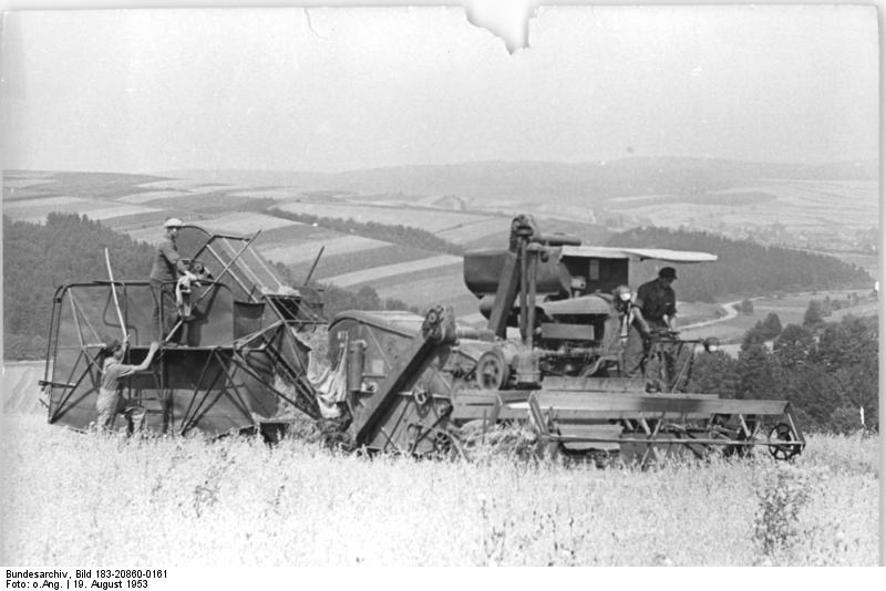 Zwinge, Getreideernte mit Mähdrescher, Hafer Zentralbild TBD Str.-Kr. 19.8.1953. Ernte an der Demarkationslinie. In der Flur Zwinge, Kreis Worbis, ist durch Grenzbegradigung auch ein 8 ha grosses Feld in Eigentum der Gemeinde Zwinge übergegangen. Die werktätigen Einzelbauern von Zwinge bearbeiten diesen Acker gemeinsam und hatten ihn in diesem Jahre mit Hafer bestellt. UBz: Mähdrescherführer Franz Katkowski von der MTS Teistungen und sein Gehilfe Karl-Heinz Levin ernten den Haferschlag mit dem "Stalinez 4" ab.